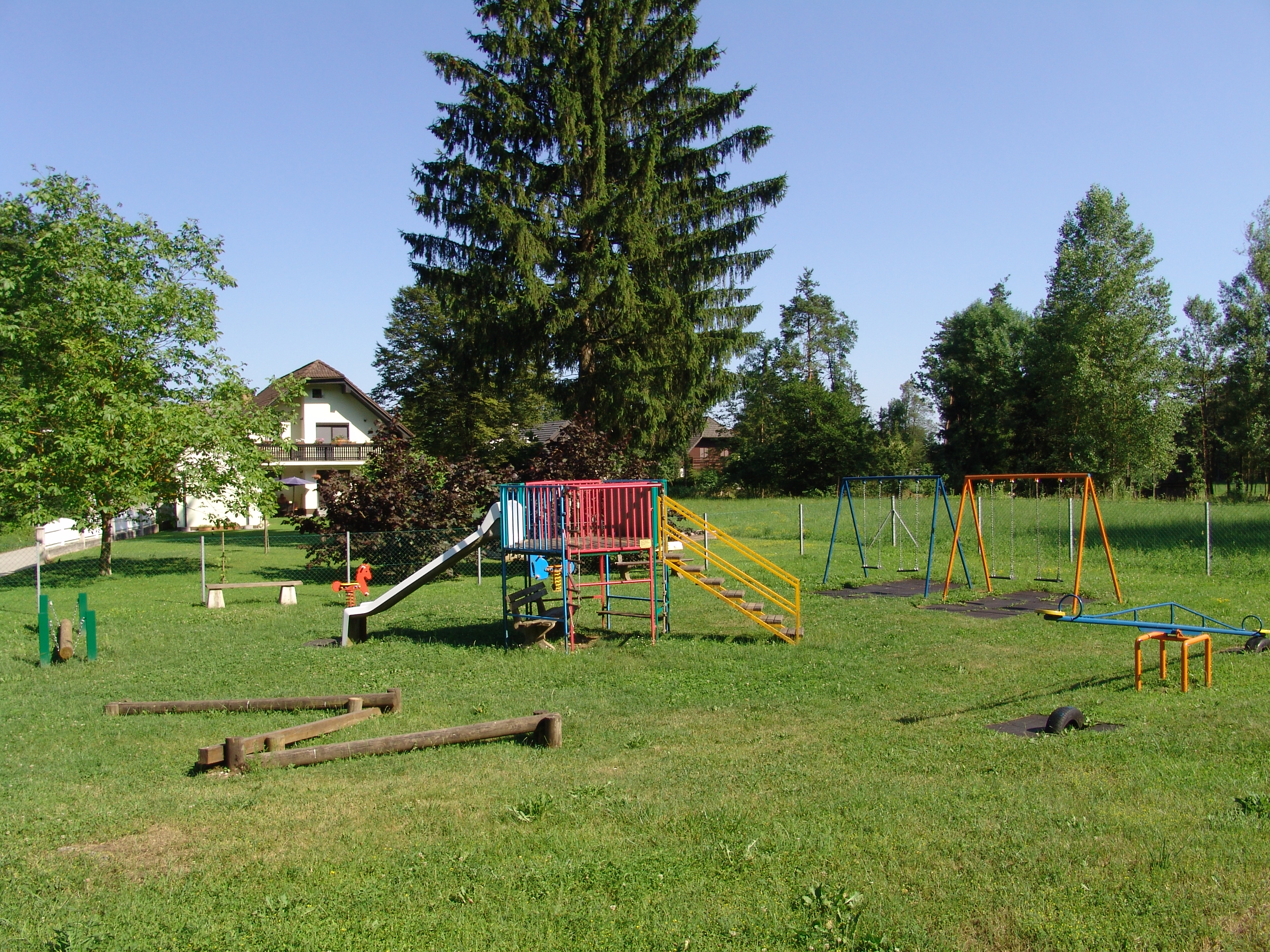 Igrišče ob reki Kokri